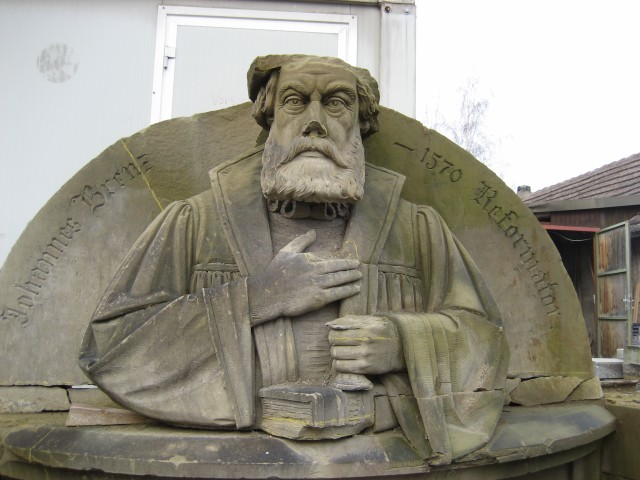 Johannes_Brenz, German Reformer